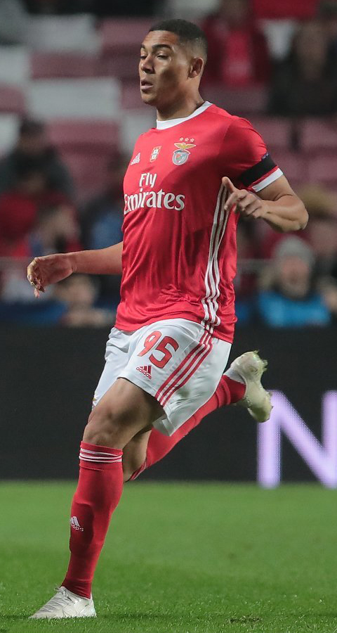 «Зенит» уступает «Бенфике» и покидает еврокубки. Фоторепортаж из Лиссабона